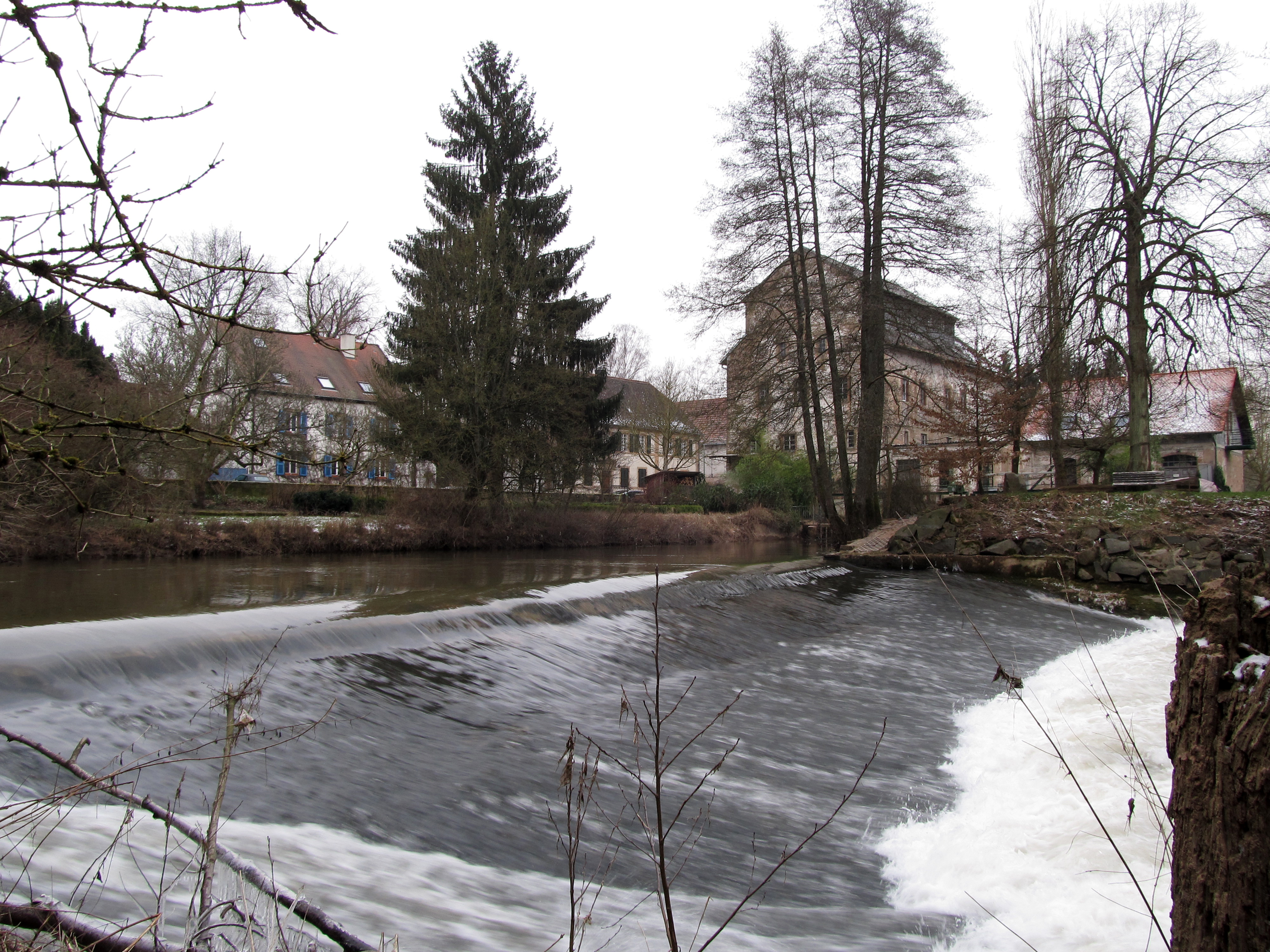 Mimbach (Blieskastel), Alte Mühle und Streichwehr